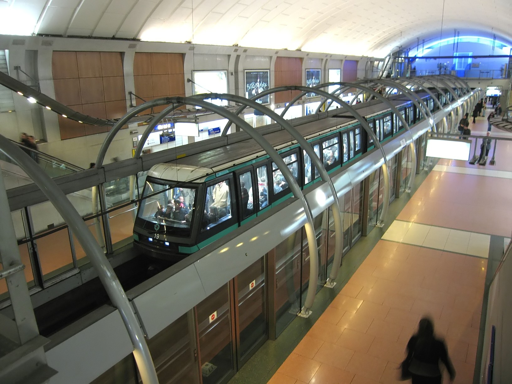 Métro de Paris, Station Chatelet (ligne 14), Paris, France